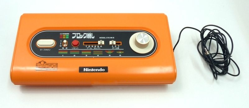 Photo de la console NINTENDO TV BLOCK KUZUSHI